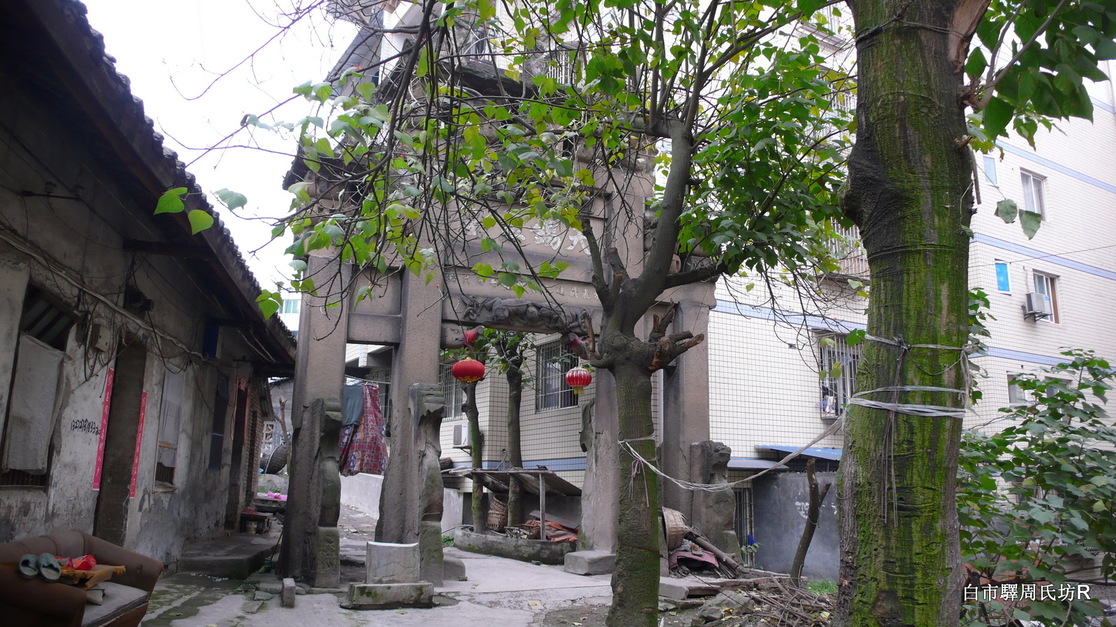 重慶白市驛周氏坊